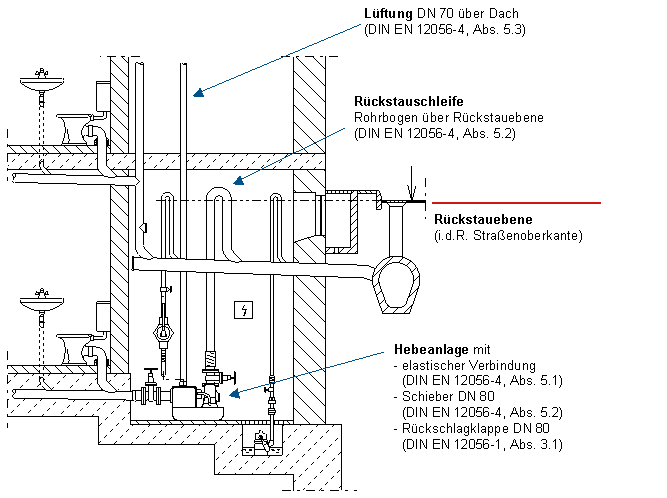 Rückstausicherung